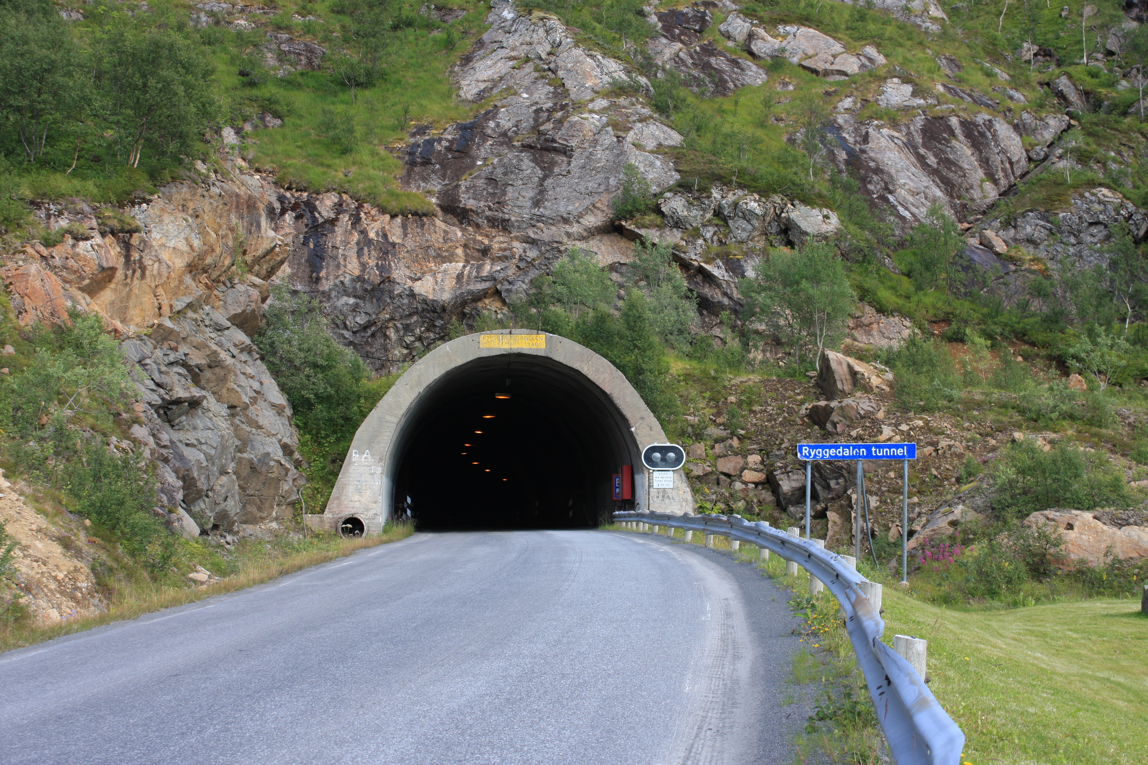 Nordvest-innslaget til tunnel.